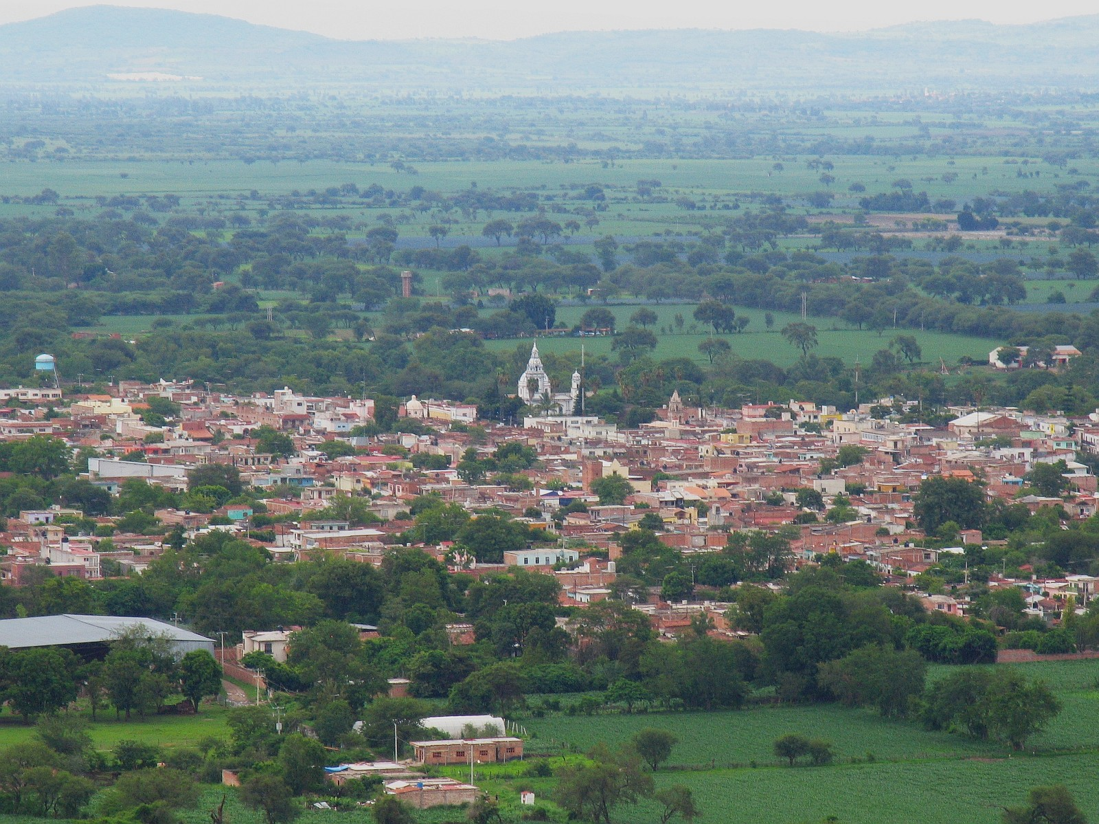 Desde el cerrito de la Cruz